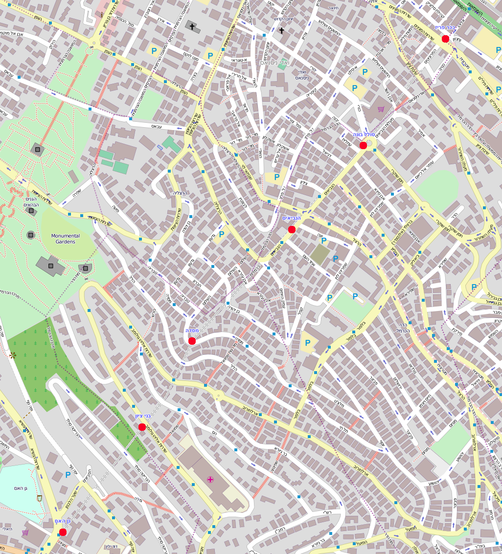 Carmelit map